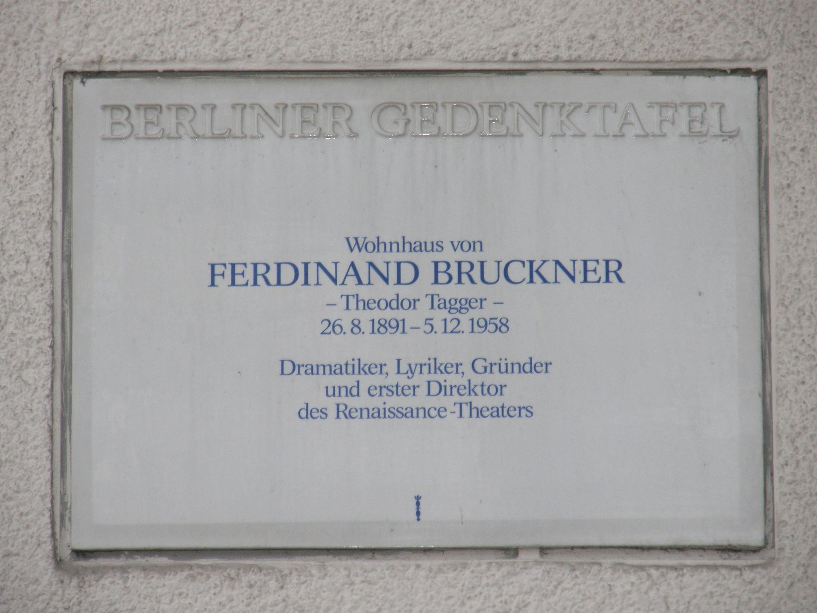 Berliner Gedenktafel für Ferdinand Bruckner. Kaiserdamm 102, Berlin-Charlottenburg. Enthüllt am 30. Oktober 1987.